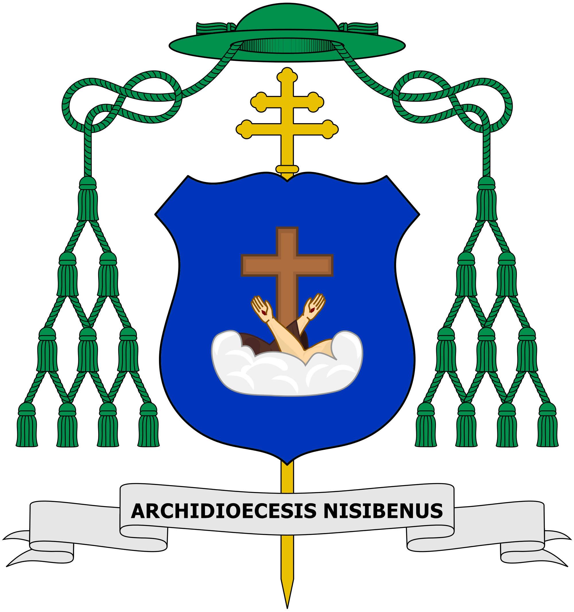 Escudo utilizado por José Calzado López, arzobispo titular de Nísibe.